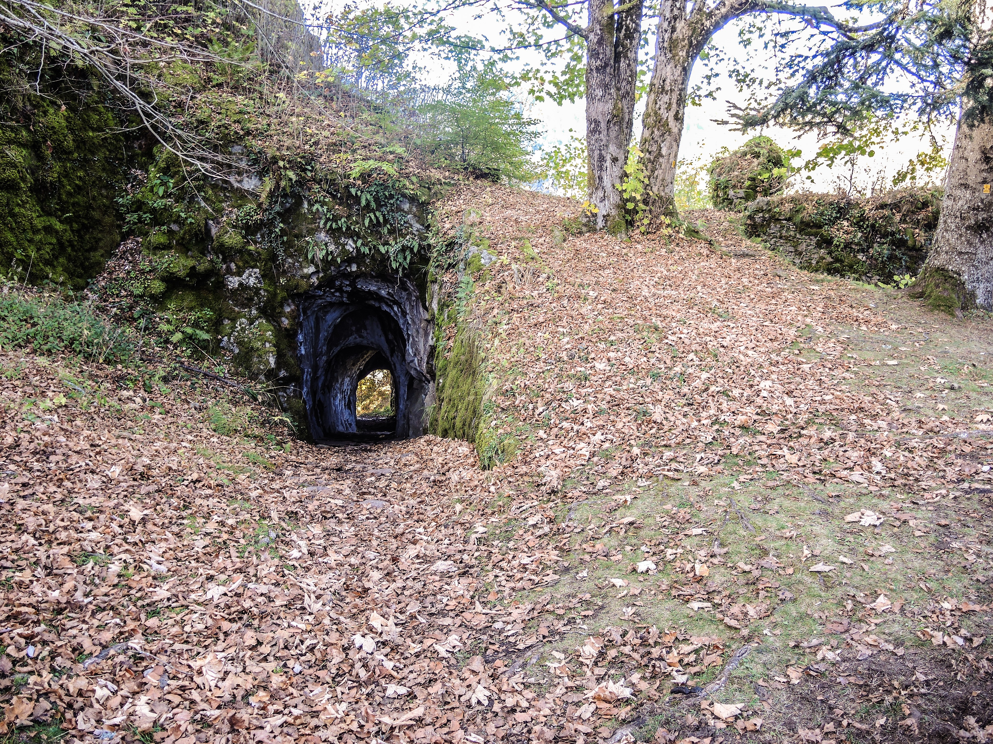 Schlossberg. Entrée du château, vue de la première enceinte ou basse-cour. Kruth, Haut-Rhin.